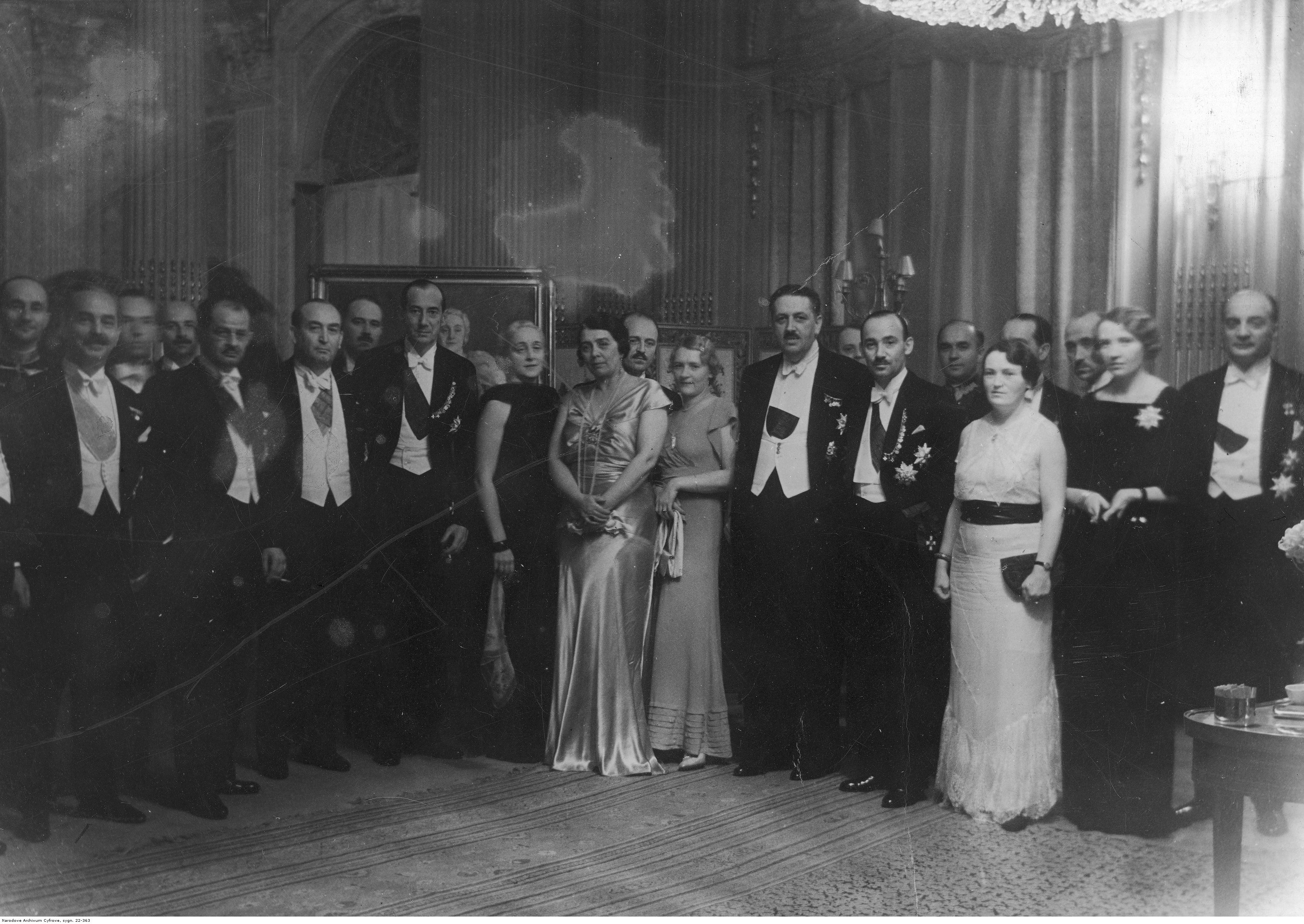 Zaproszeni goście. Widoczni w I rzędzie m.in. premier Leon Kozłowski (2. z lewej), premier Gyula Gömbös de Jákfa (3. z lewej), minister Józef Beck (4. z lewej), Karol Romer (1. z prawej), minister Wacław Jędrzejewicz (4. z prawej), Jan Szembek (5. z prawej), minister Tadeusz Kasprzycki.